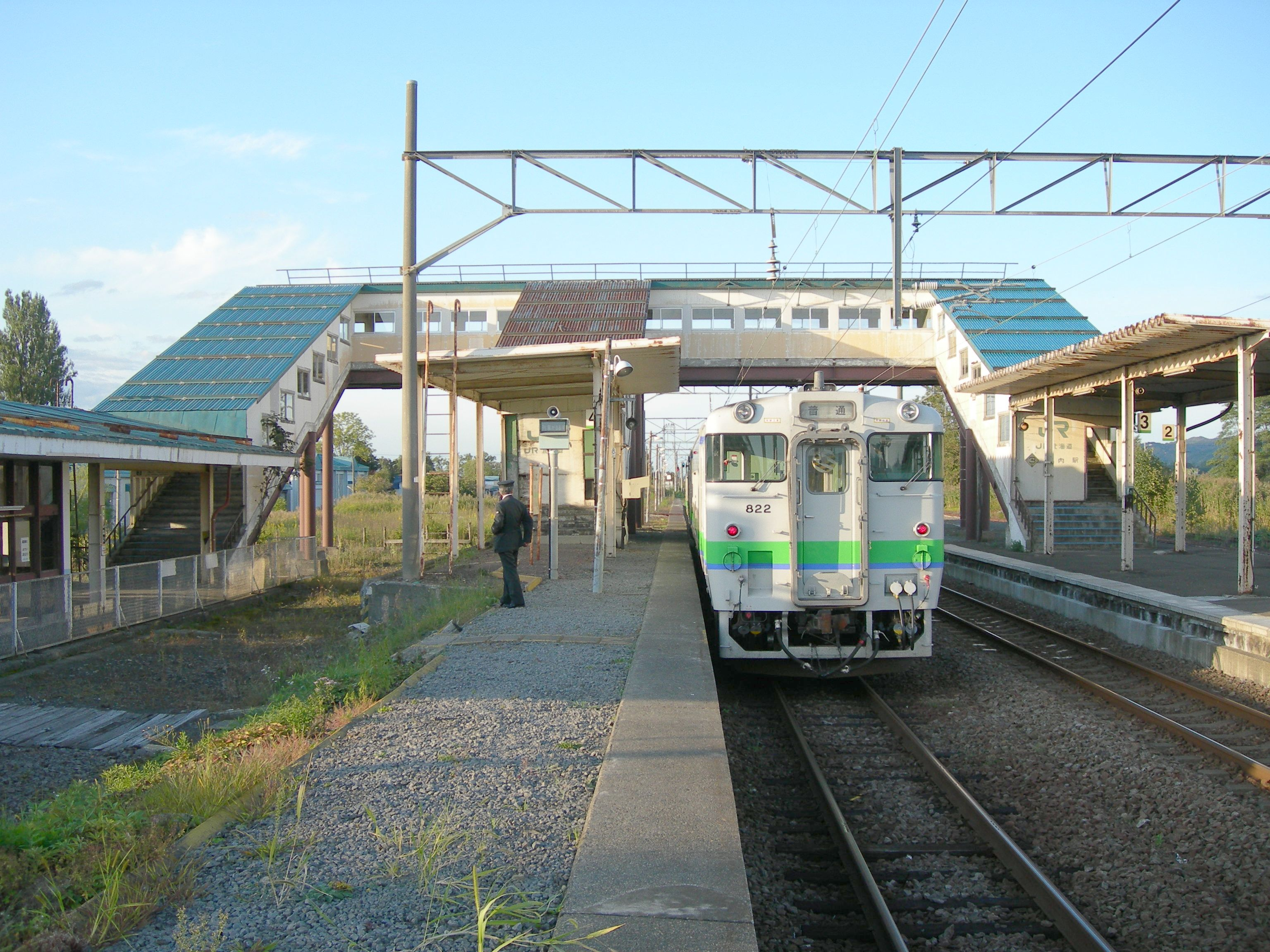 茶志内駅